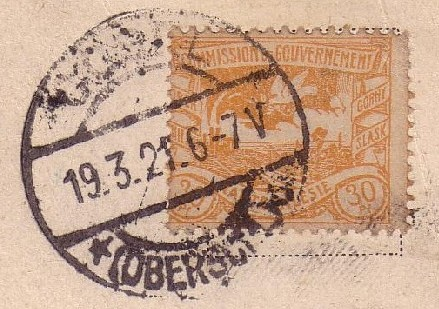 Briefmarke zur Volksabstimmung in Oberschlesien mit Stempel "Cosel, 19. März 1921"